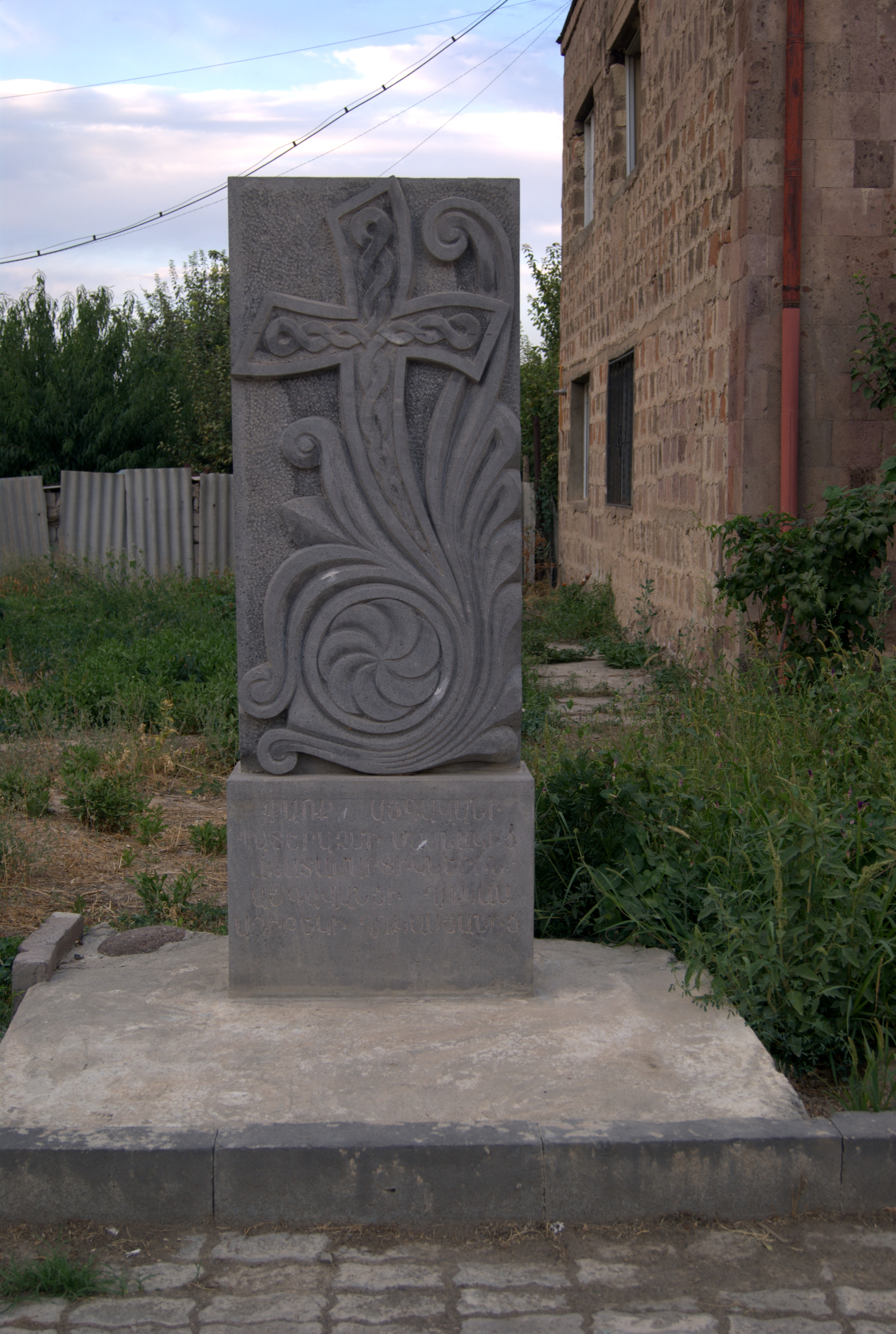 Խաչքար Այգավանի ազատամարտիկներին 8/1